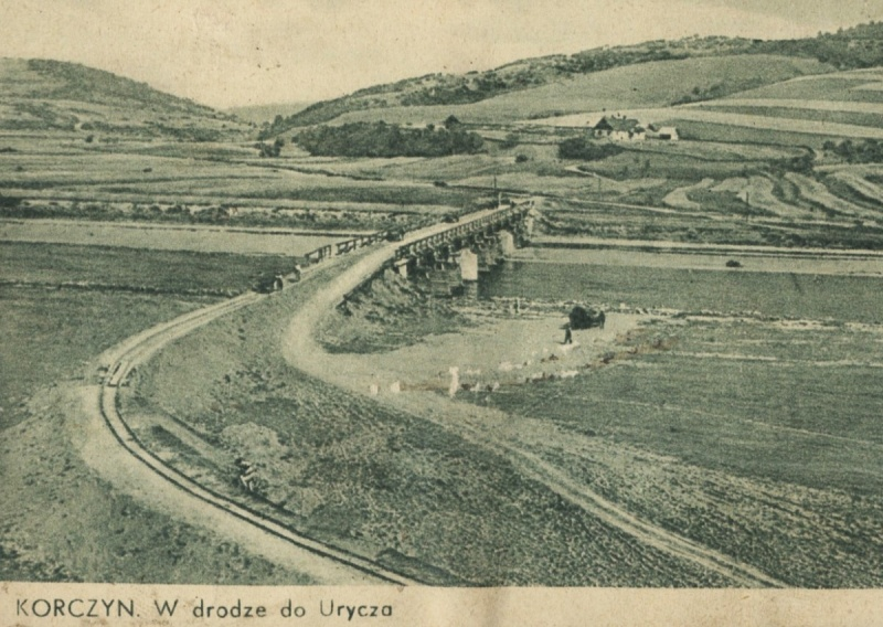 Старое фото с. Корчин (ныне Сколевский р-н Львовской области)